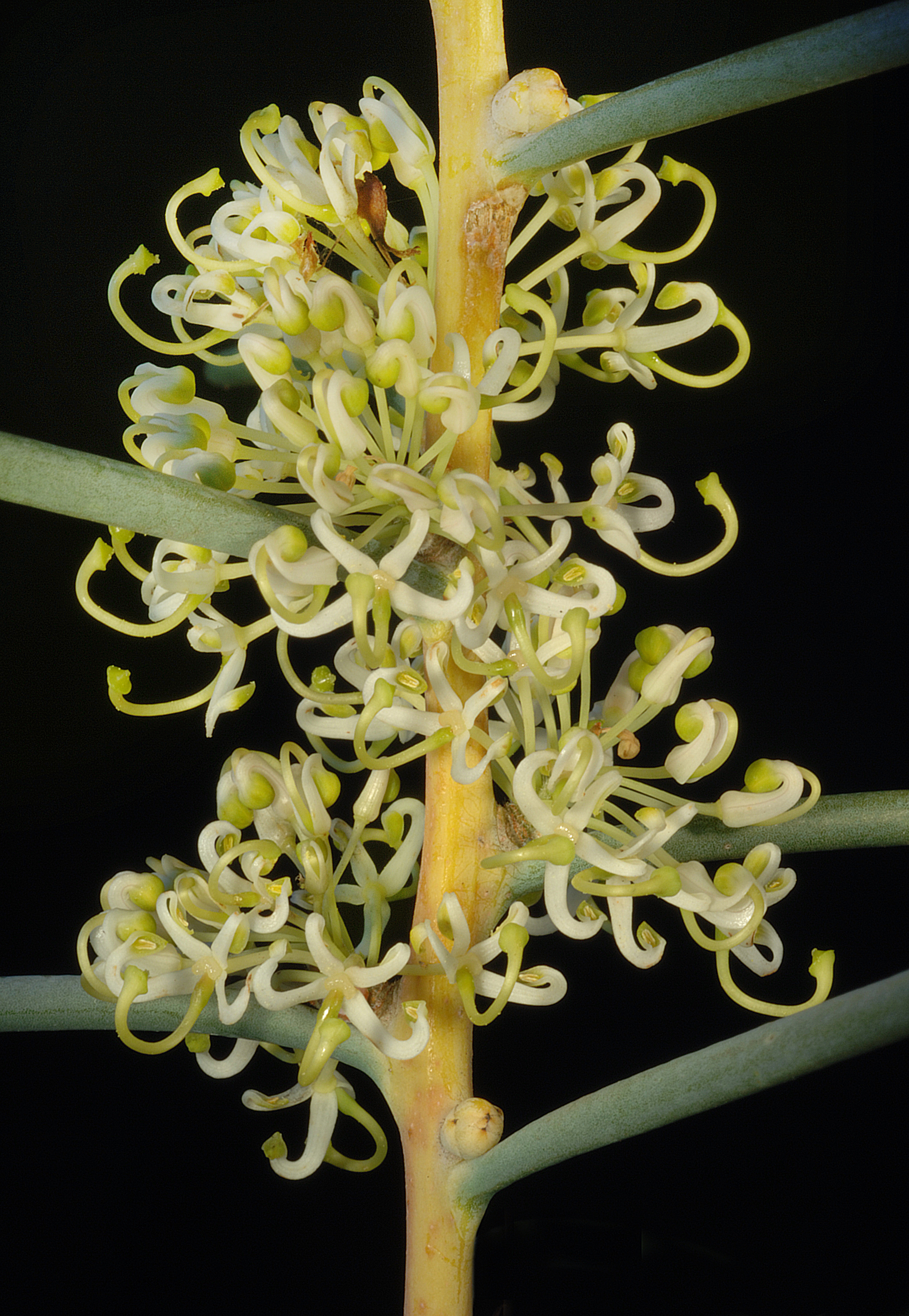 KRT3579